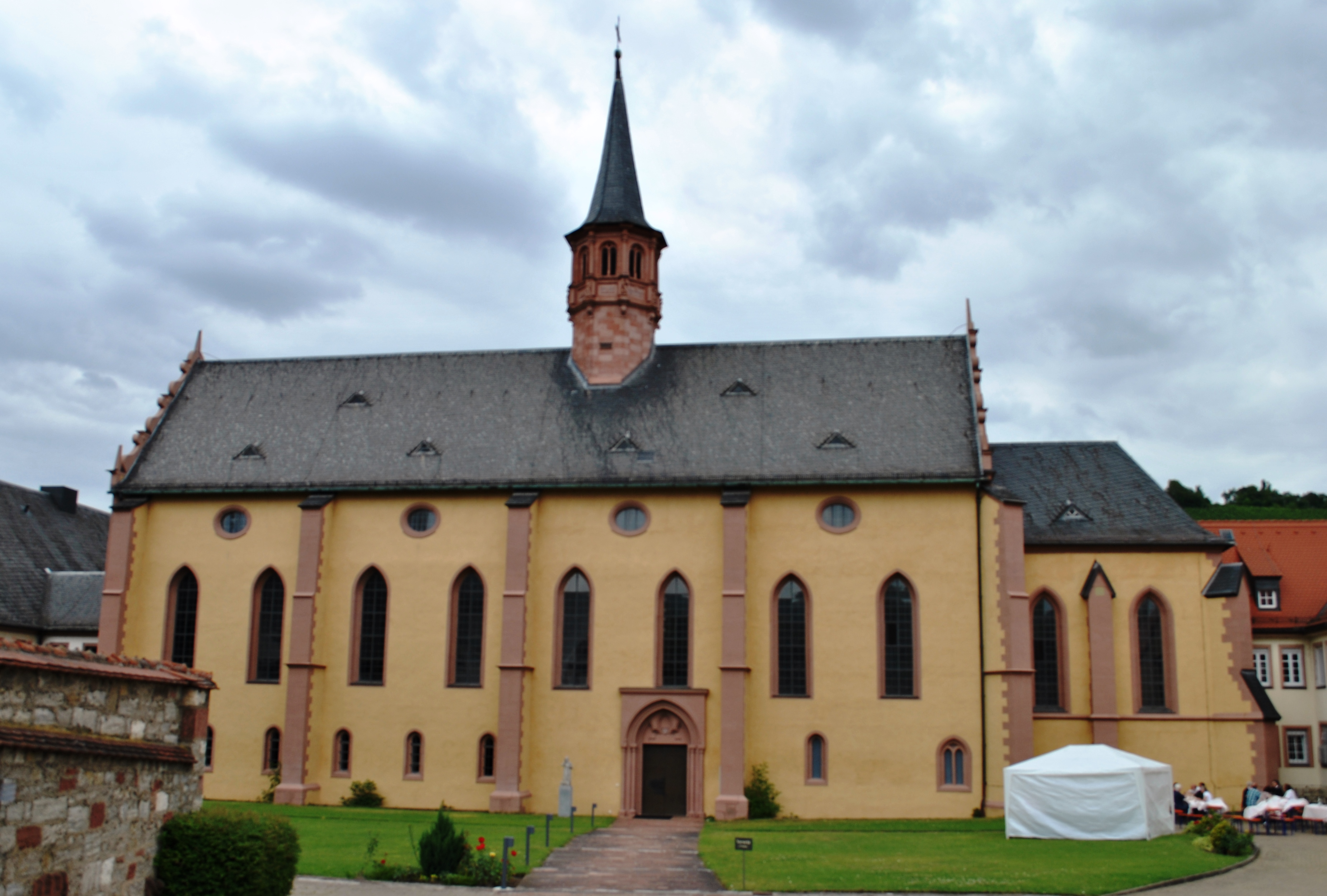 Klosterkirche Himmelspforten, Konventsgebäude